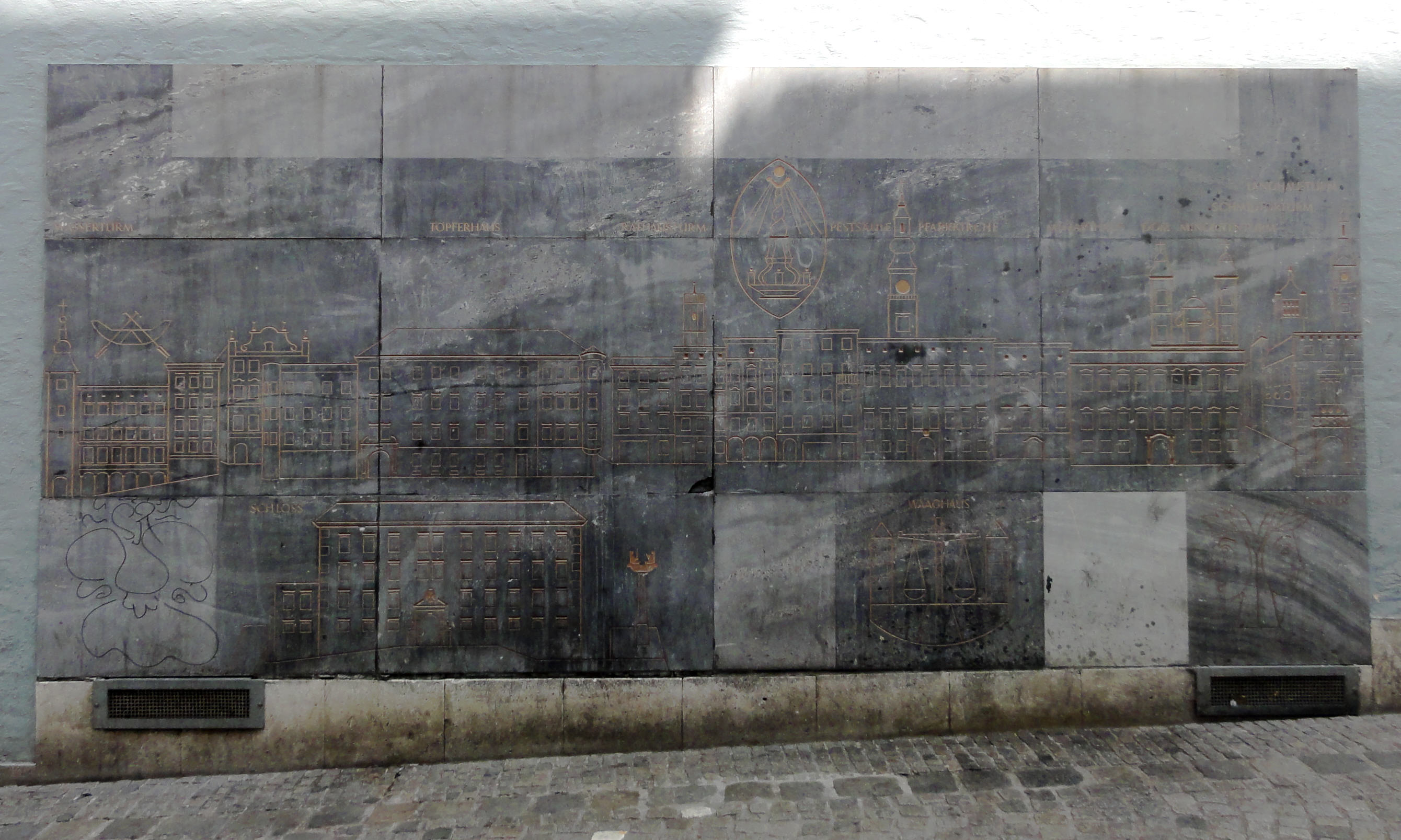 Altstadt Linz 1650 von Herbert Dimmel und Peter Dimmel (1962), Linz, Altstadt 1